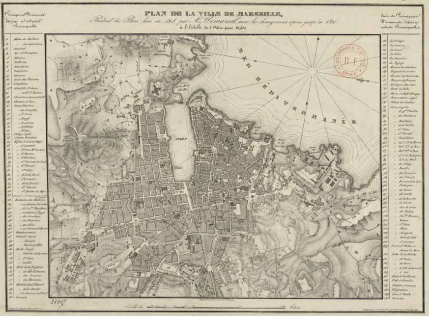 Plan de marseille en 1830